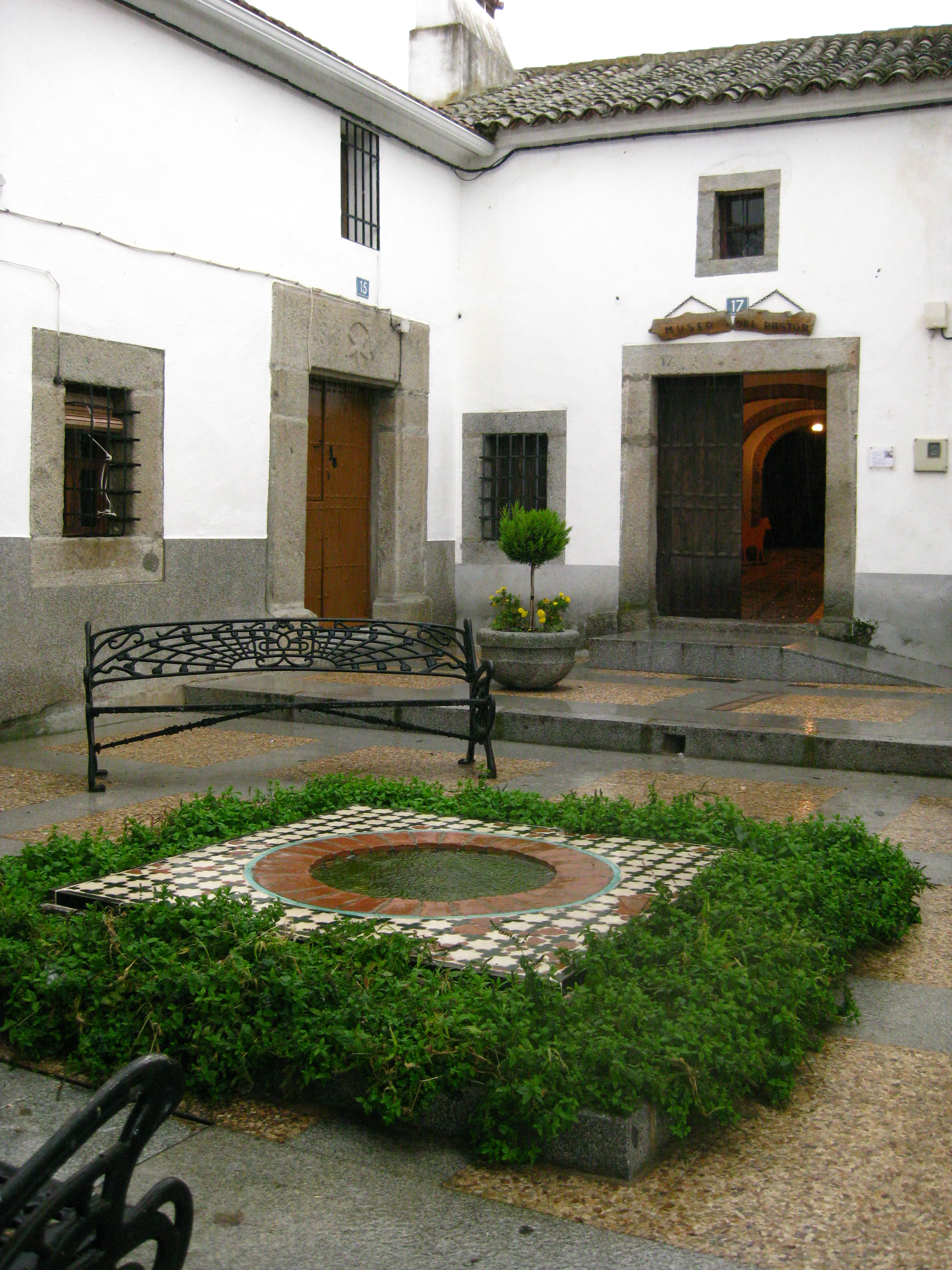 Rincón típico. Noviembre de 2011